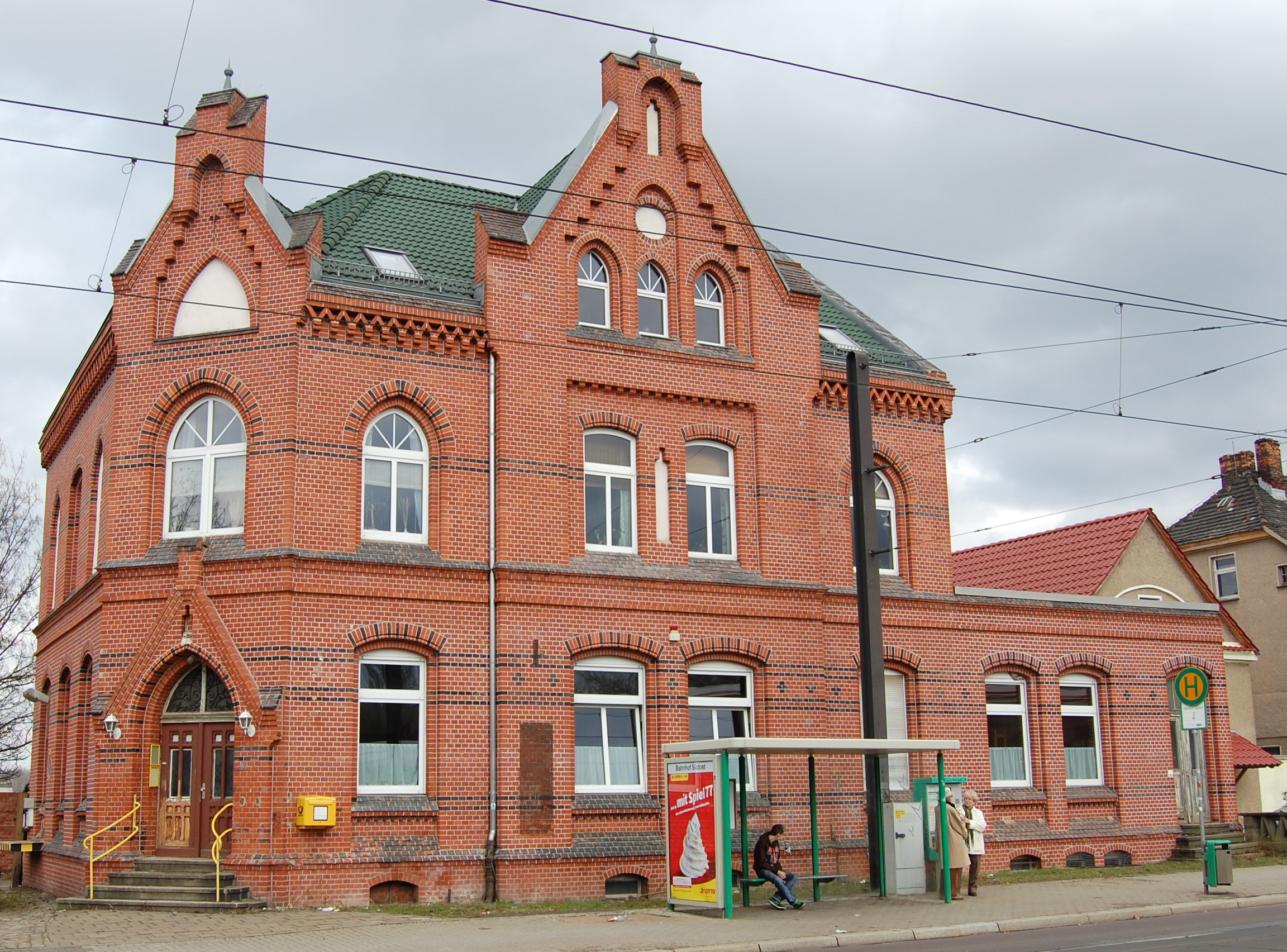 ehemaliges Postamt in Salbke, Magdeburg